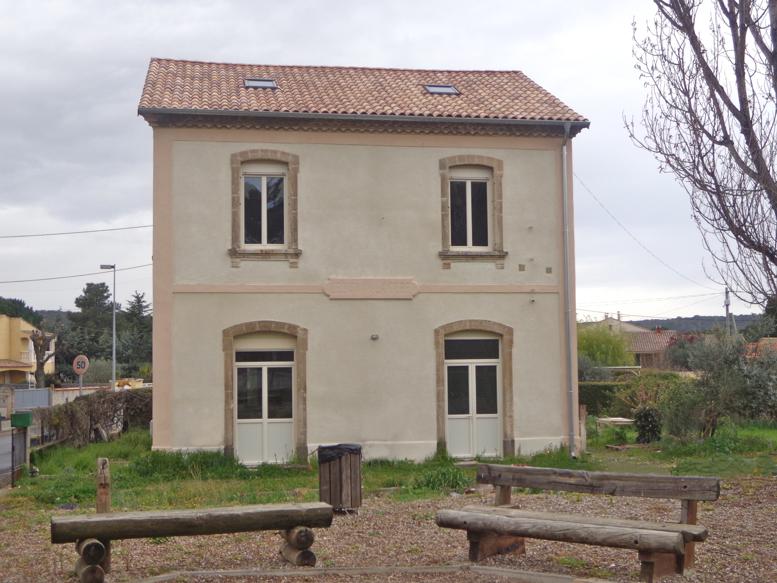 Lézignan-la-Cèbe (Hérault) - ancienne gare.